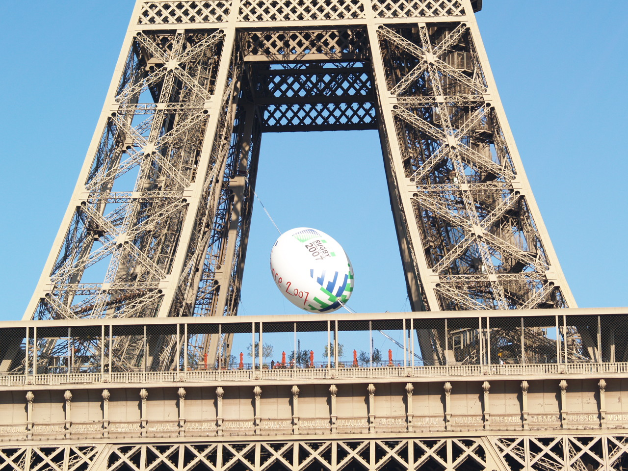 Coupe du Monde de Rugby 2007